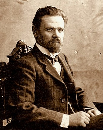 Русский историк, политический и общественный деятель Василий Яковлевич Яковлев-Богучарский (1860-1915)